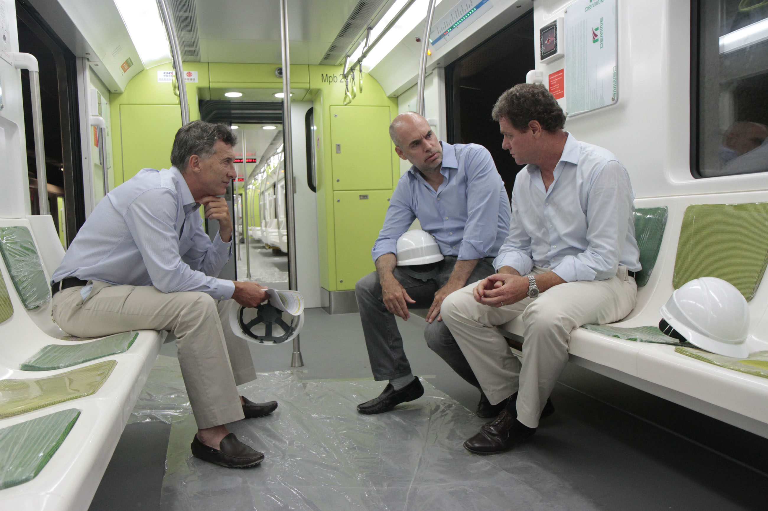 Buenos Aires. Enero 7 de 2013, El jefe de Gobierno porteño, Mauricio Macri, visitó hoy los nuevos talleres-cochera de la línea A en el barrio de Floresta, donde recorrió los modernos vagones que se incorporarán al servicio y que entrarán en funcionamiento a partir de marzo próximo. Macri estuvo acompañado en la oportunidad por el jefe de Gabinete, Horacio Rodríguez Larreta, y por el titular de la empresa Subterráneos de Buenos Aires (Sbase), Juan Pablo Piccardo. Foto María Inés Ghiglione-gv/GCBA.